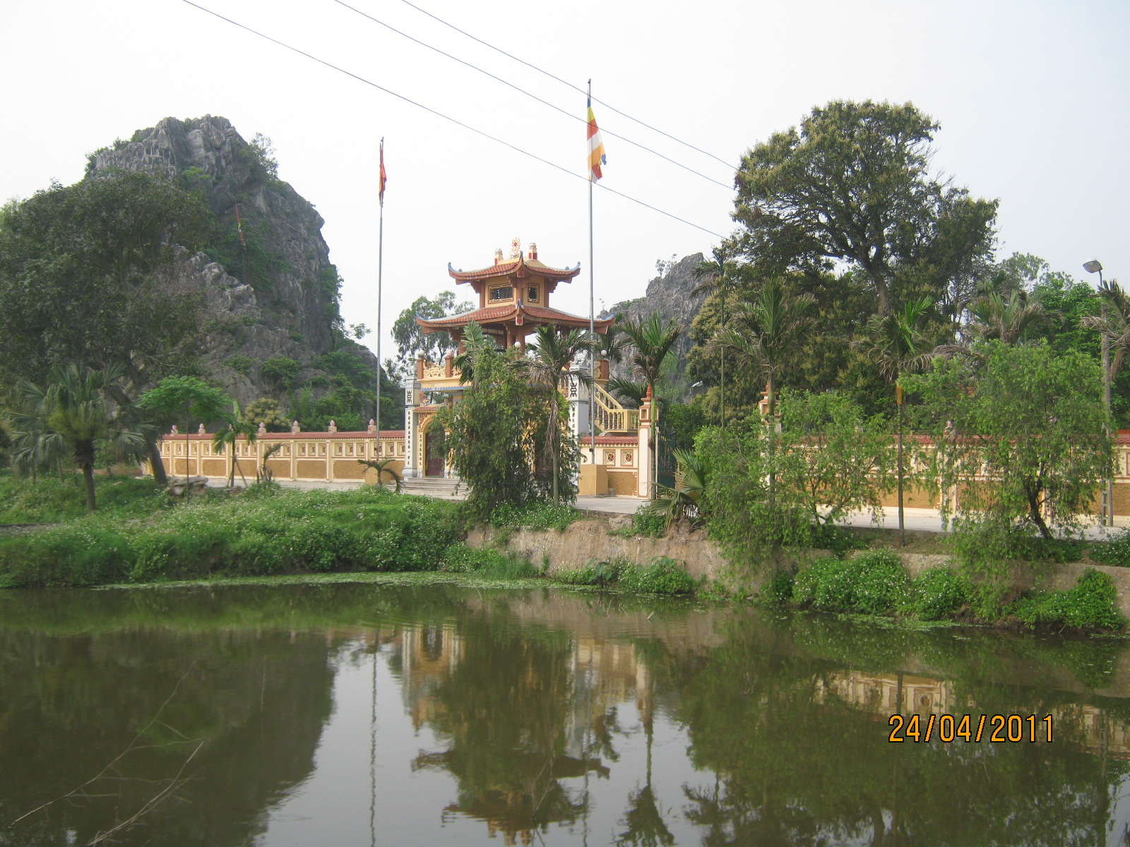 Chùa A Nậu (tên địa phương là chùa Sêu) ở Ninh Khánh, thành phố Ninh Bình do Trần Thái Tông xây dựng.